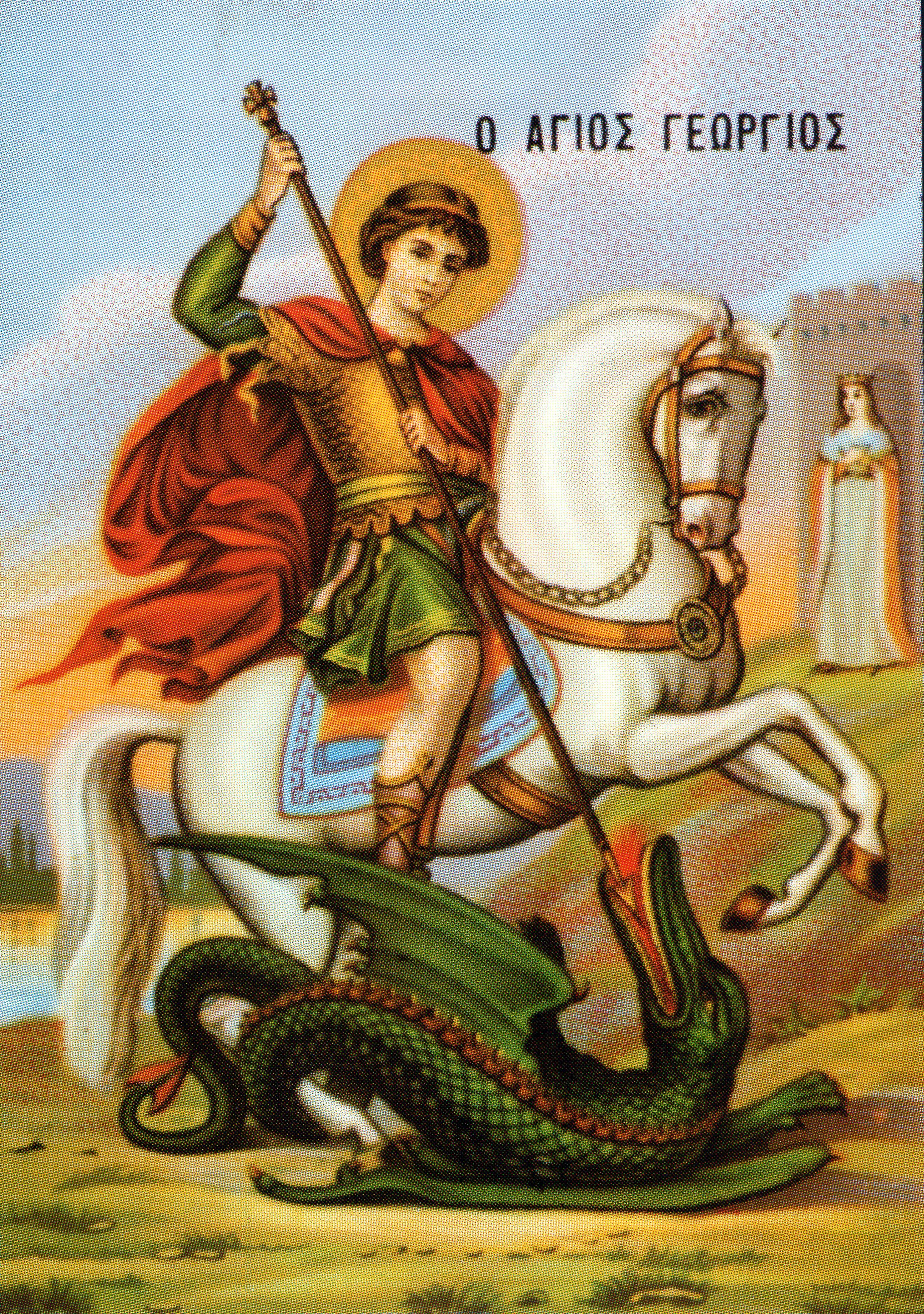 Imagen tradicional de San Jorge de Capadocia, mártir.